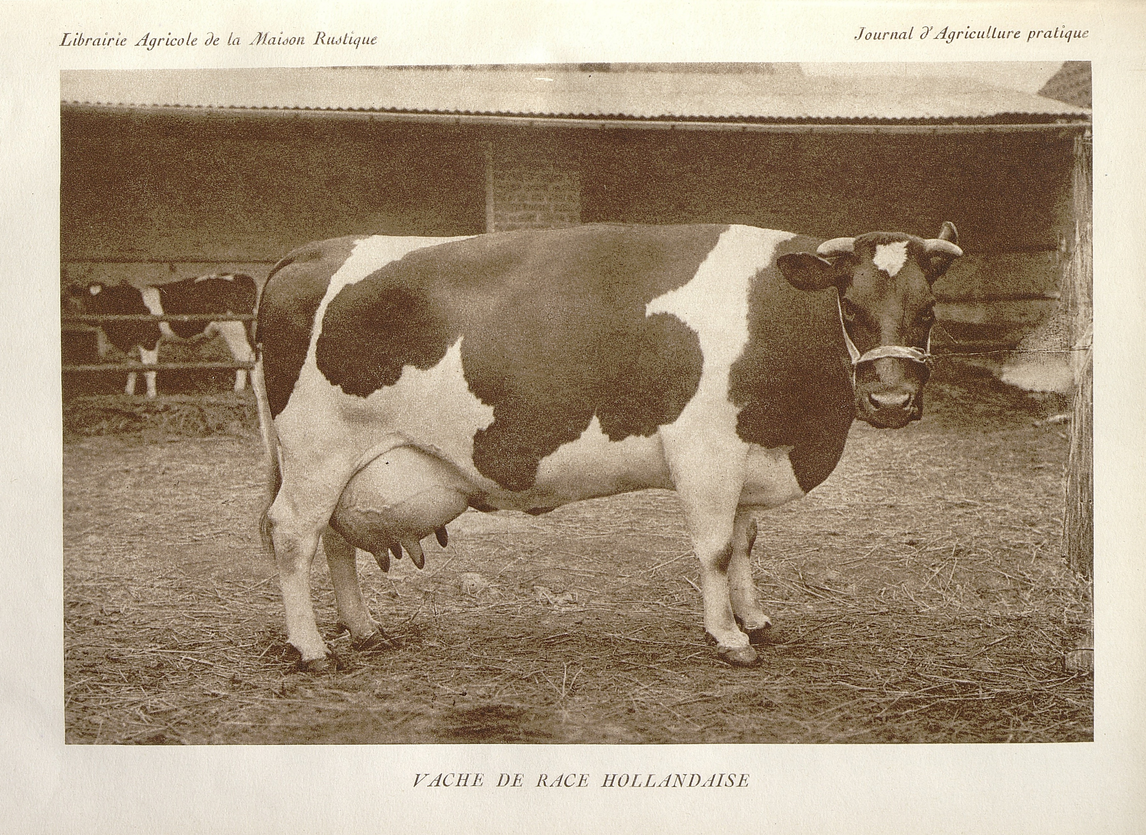 Illustration issue de l'article "La race bovine hollandaise", H. Mahuet, Journal d'agriculture pratique, de jardinage et d'économie domestique, Paris, Librairie agricole de la maison rustique, 1930, volume 1, p. 254. Ouvrage appartenant à la Bibliothèque historique du ministère de l'Agriculture, déposée à la MRSH Caen. Fichier : UNICAEN_B_141182210_JAP_1930_1_254_02